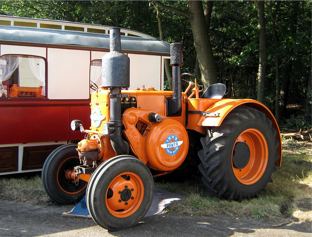 IAME Pampa-Traktor T01 mit Glühkopf (wie Lanz Bulldog), Vliegfeld Weelde, 21. Oldtimer-Festival des Historische Machineclubs Kempen, 2009